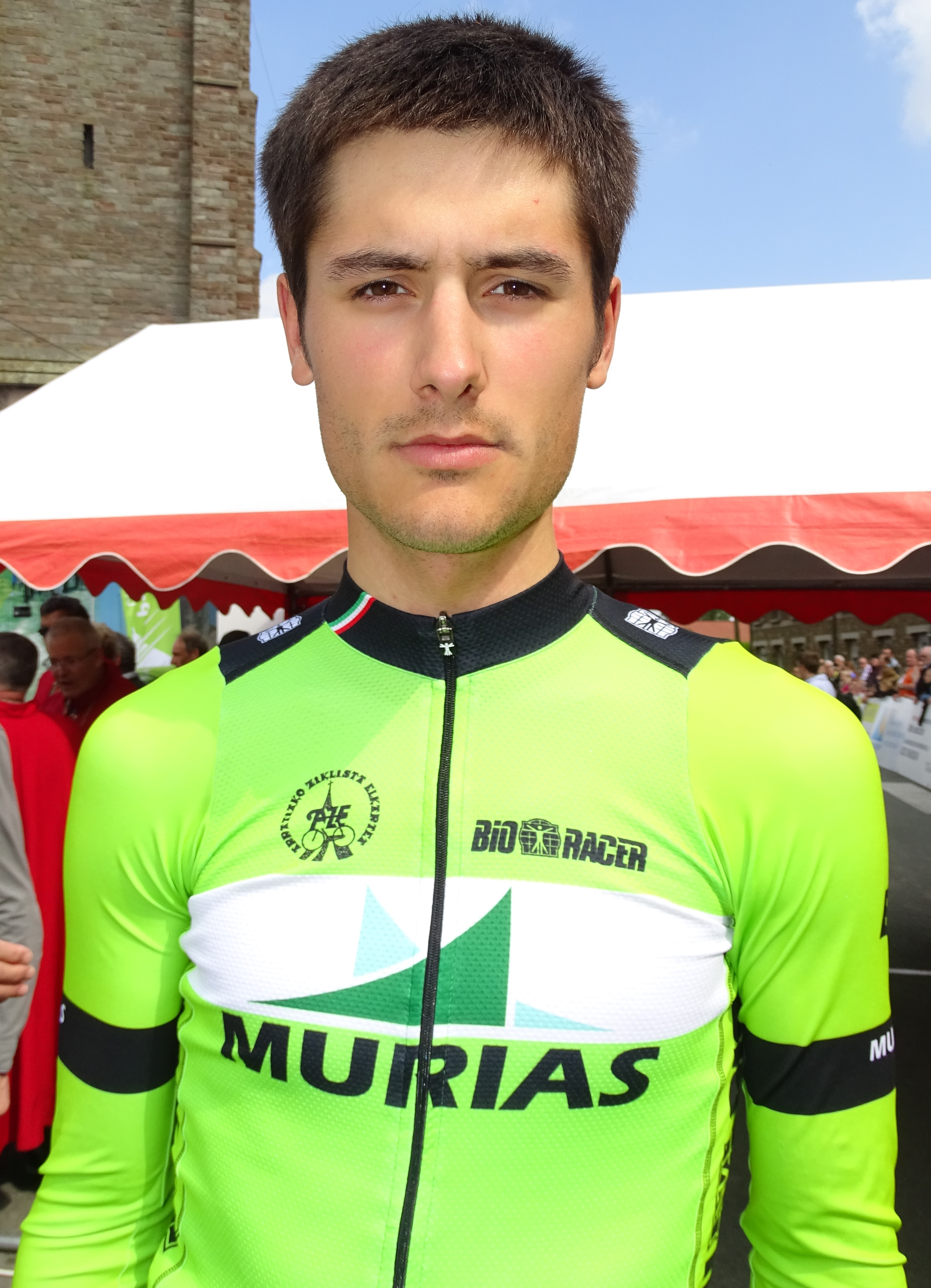 Reportage réalisé le vendredi 22 mai 2015 à l'occasion du départ du contre-la-montre par équipes de la première étape du Paris-Arras Tour 2015 à Vitry-en-Artois, Pas-de-Calais, Nord-Pas-de-Calais, France.